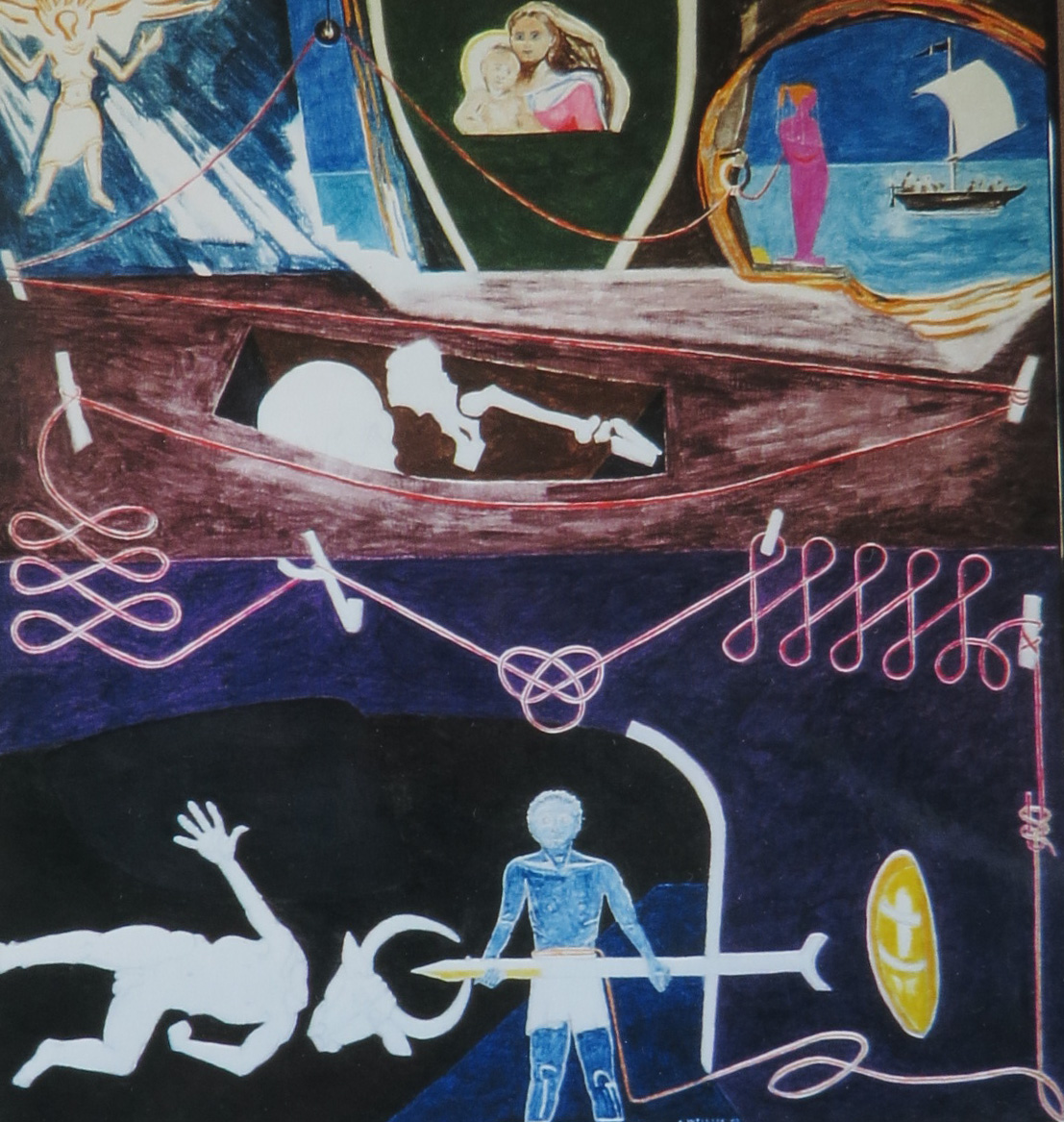 Bild zur Sage des Fadens der Ariadne.